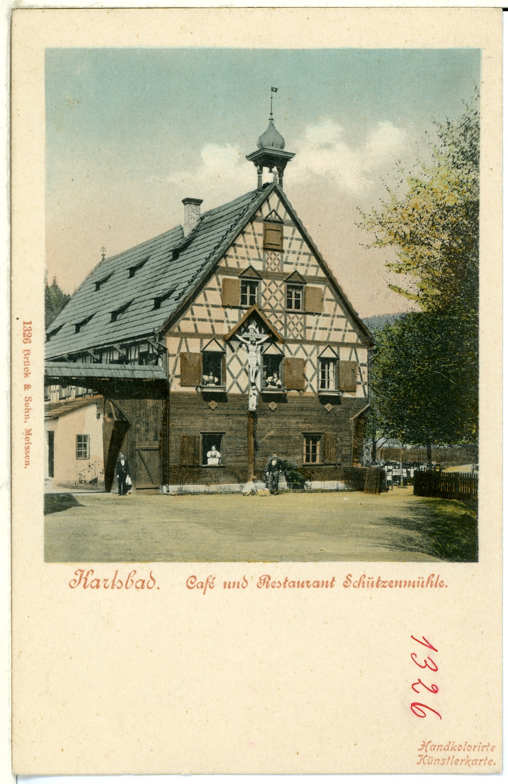 Karlsbad; Cafe Schützenmühle This postcard is from publisher Brück & Sohn in Meißen ( This postcard has a unique number 01326 and is available in a higher resolution at the publisher. This images was uploaded in a cooperation project between Wikipedians and the publisher.